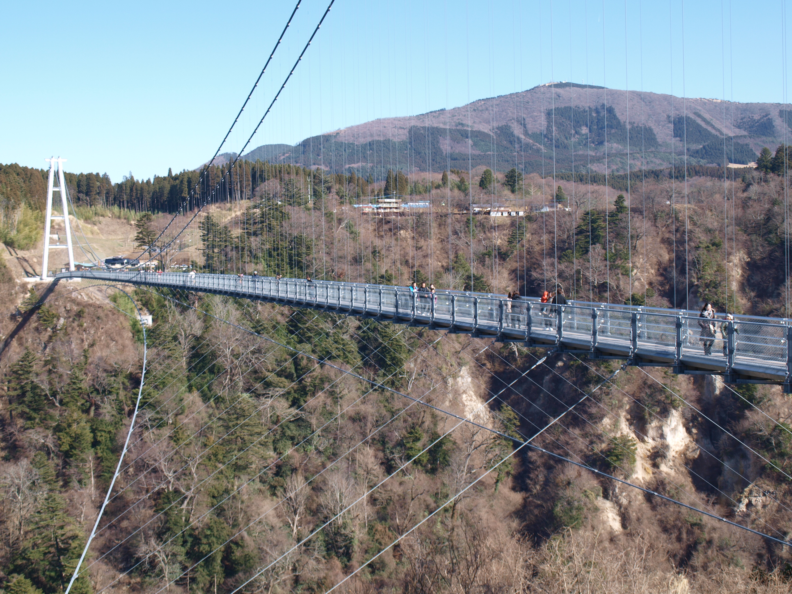 Kokonoe Yume Suspension Bridge